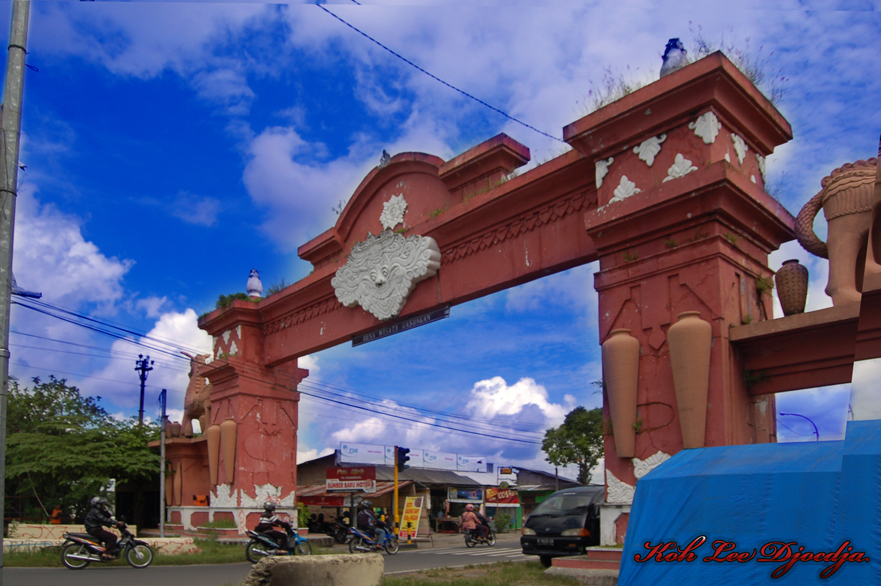 Kasongan